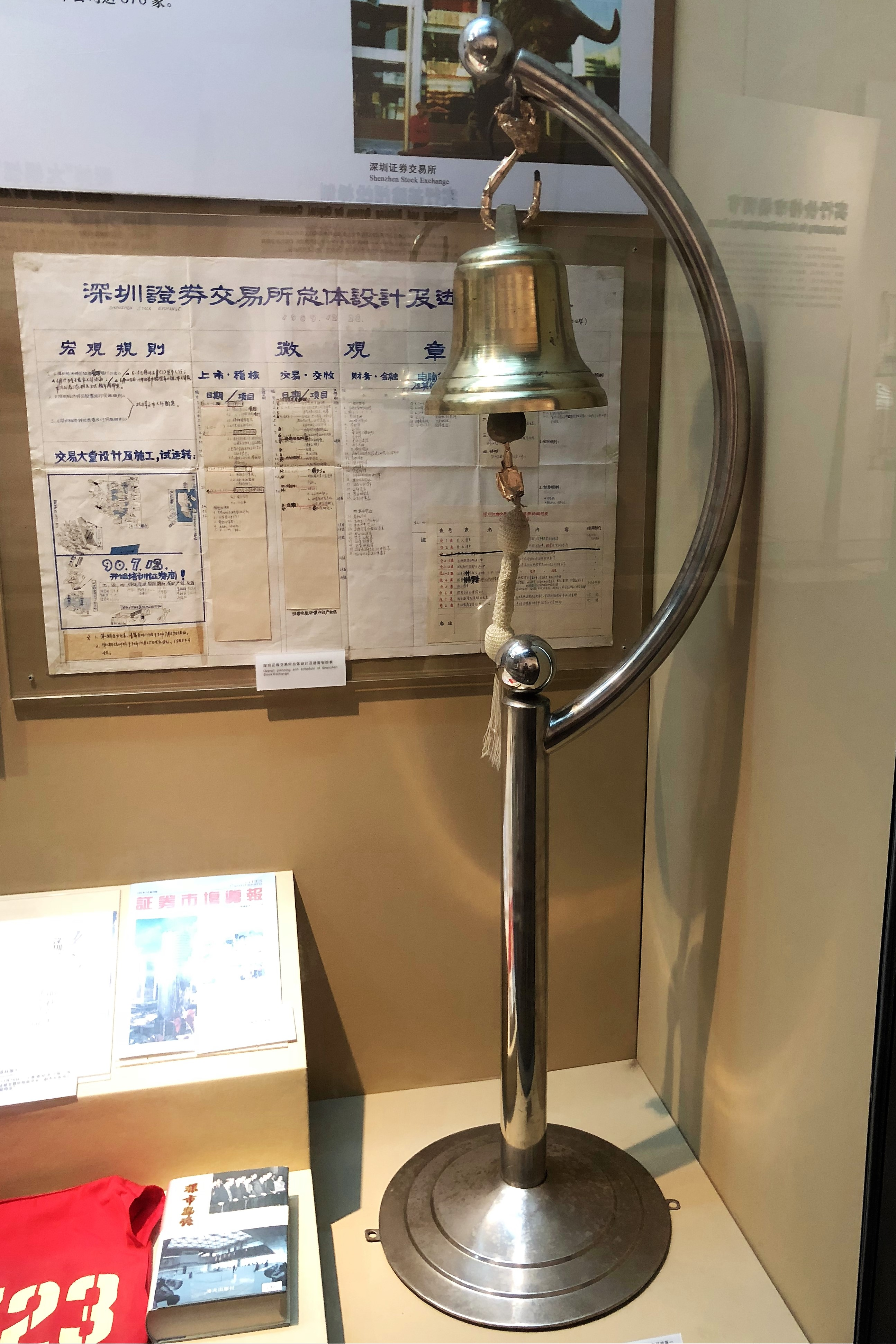 中文（中国大陆）: 1990年11月12日，新中国证券市场第一声交易钟声在深圳国际信托大厦15楼的交易所大厅敲响。这是当时的股市开市钟